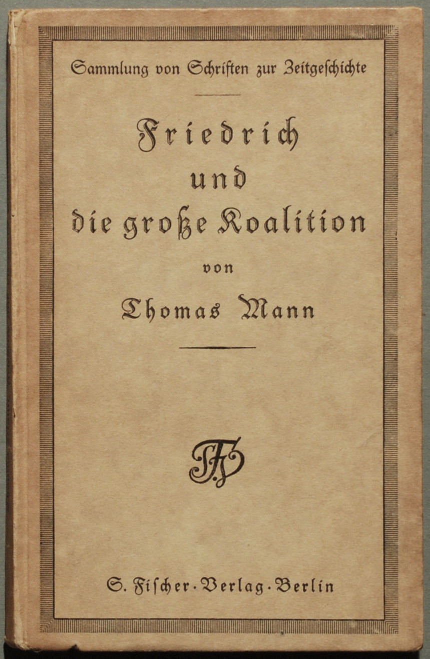 Mann, Thomas: Friedrich und die große Koalition. Berlin: S. Fischer 1915, 131 Seiten + 2 Blatt Verlagsanzeigen; Sammlung von Schriften zur Zeitgeschichte [5. Band]. - Erstdruck (Potempa B 63.1, Bürgin I 11, Wilpert/Gühring² 13). Inhalt: Gedanken im Kriege. - Friedrich und die große Koalition. - An die Reaktion des "Svenska Dagbladet", Stockholm. Original-Pappband kl. 8° (184 x 118 mm) mit Rückenlängstitel.